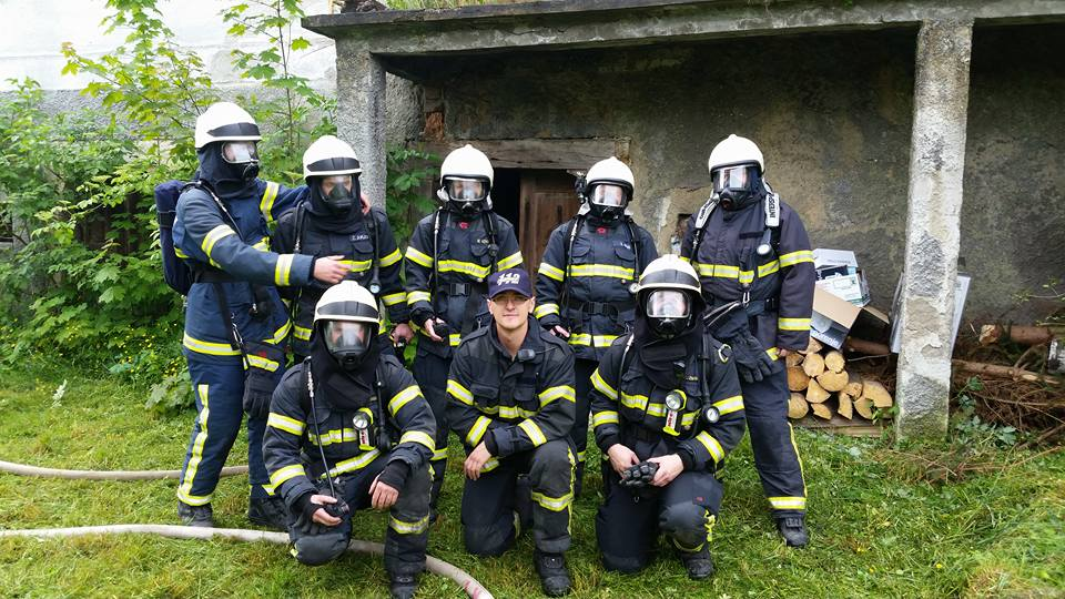 Gasilci v polni zaščitni opremi, opremljeni z dihalnimi aparati, pripravljeni na vstop v zadimljen prostor.